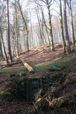 Eingang zum ehemaligen berwerksstollen zwischen Ober-Ramstadt und Nieder-Modau